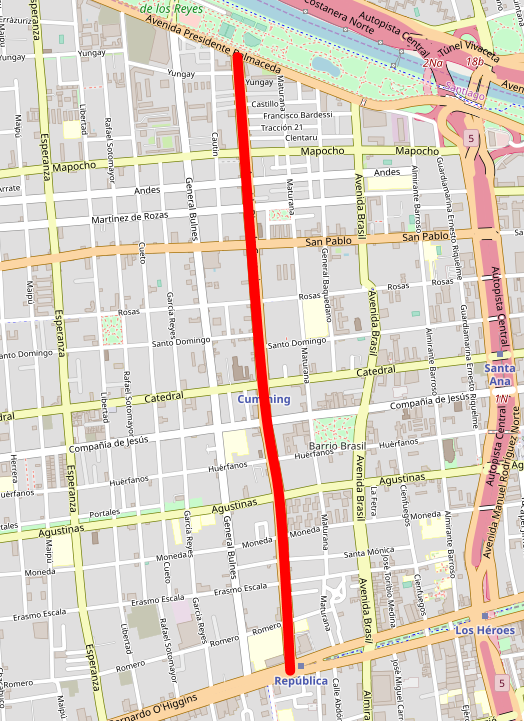 Mapa de la Avenida Ricardo Cumming, en Santiago